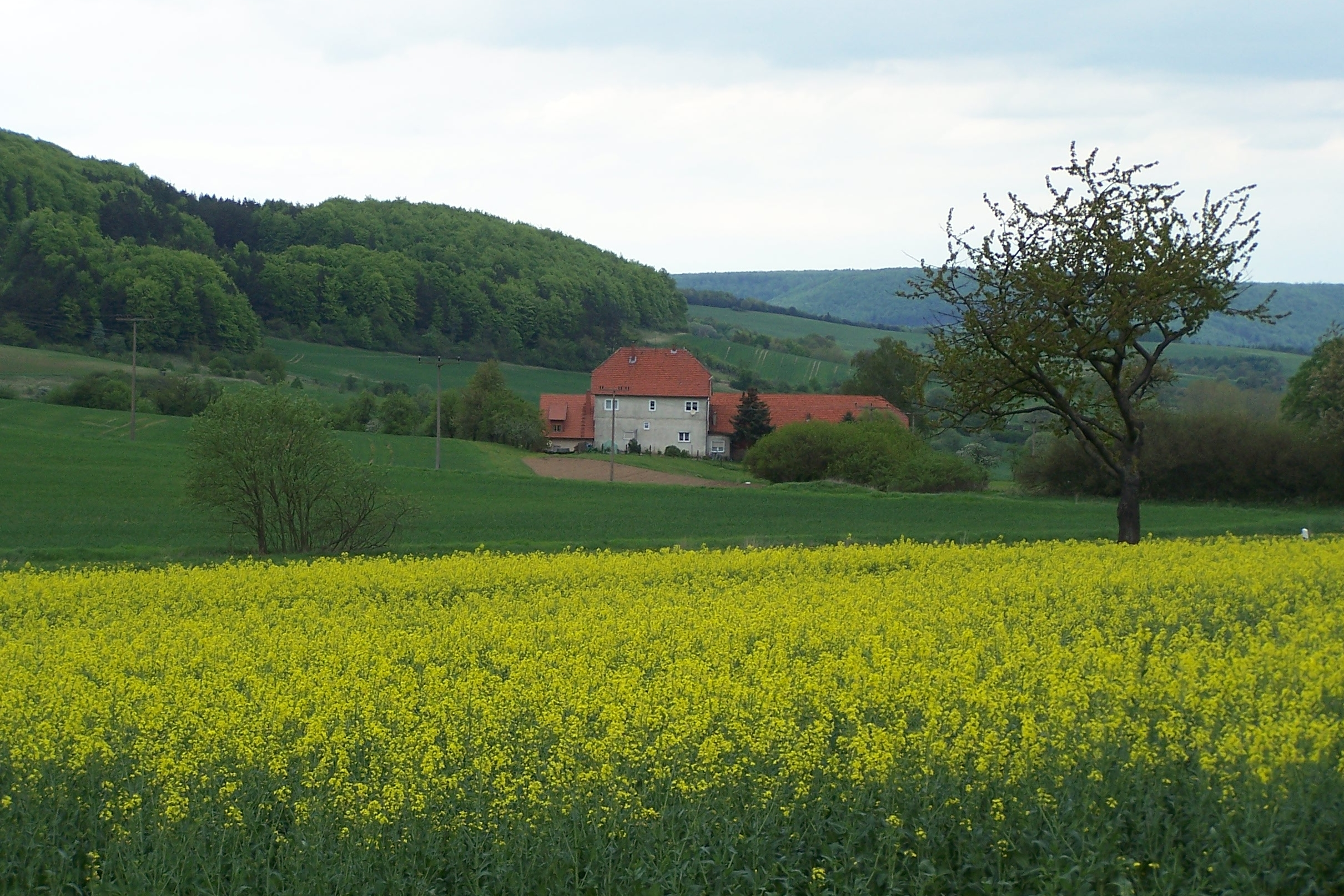 Das ehemalige Gut Schrapfendorf bei Schnellmannshausen, Ansicht von Süden.